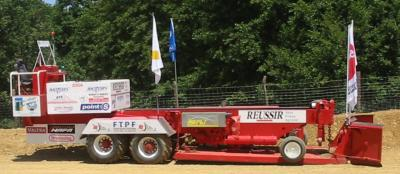 remorque tractorpulling prise par moi meme le 4/7/2004 a Lavaur lors d'une manche du championnat d'europe